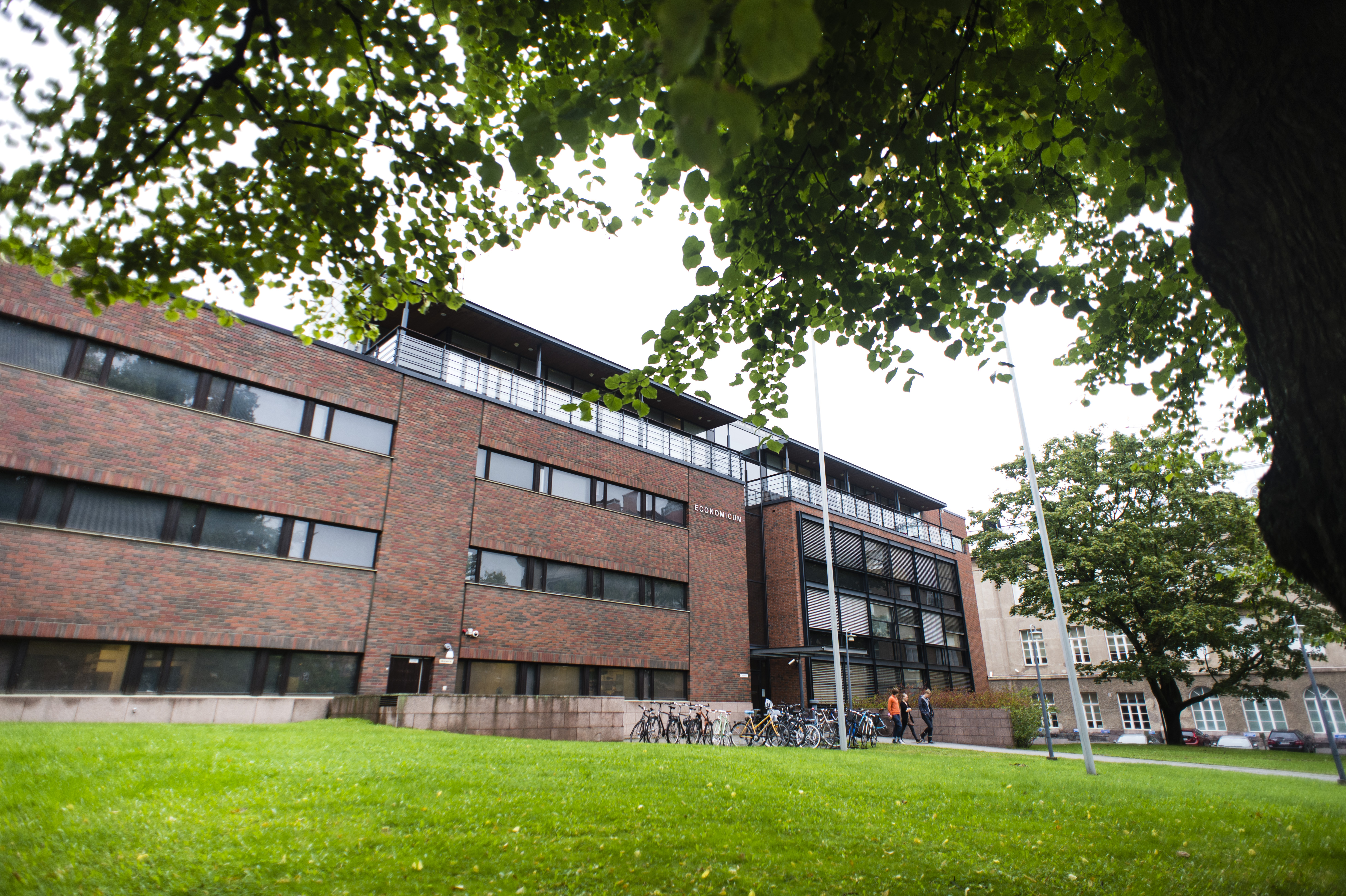 VATT sijaitsee Economicum-rakennuksessa Helsingin Arkadiankadulla.